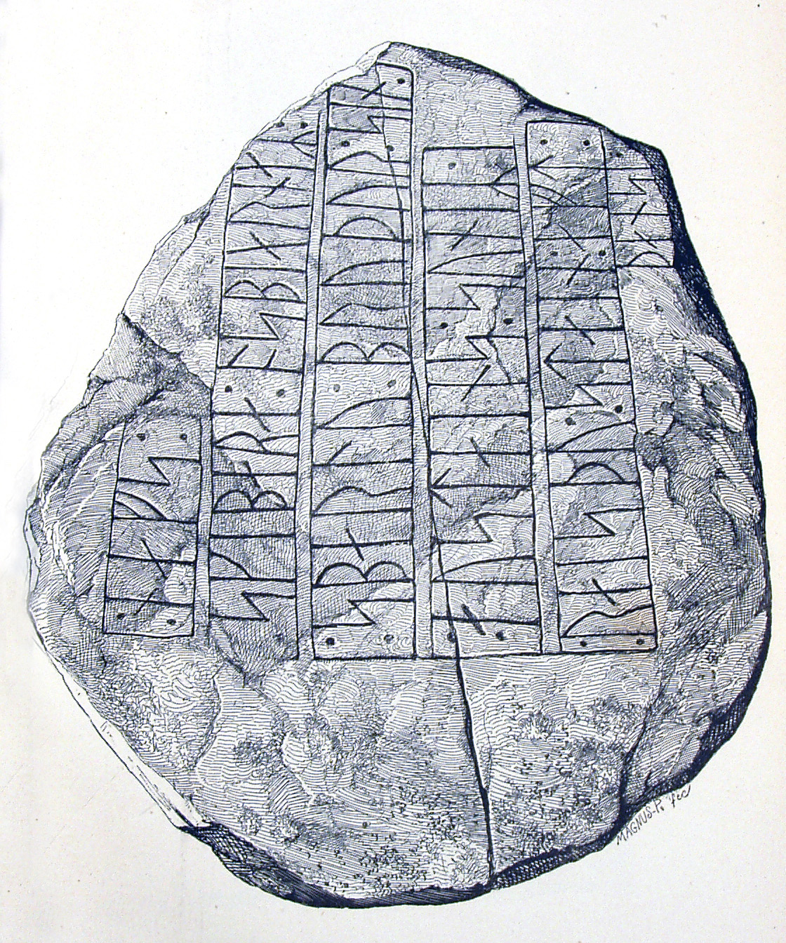 Tågerup-stenen er en runesten, fundet i Tågerup på Lolland. Stenen fandtes 25/3 1868